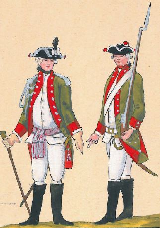 32. Korpus pontonierów koronnych (oficer i szeregowy